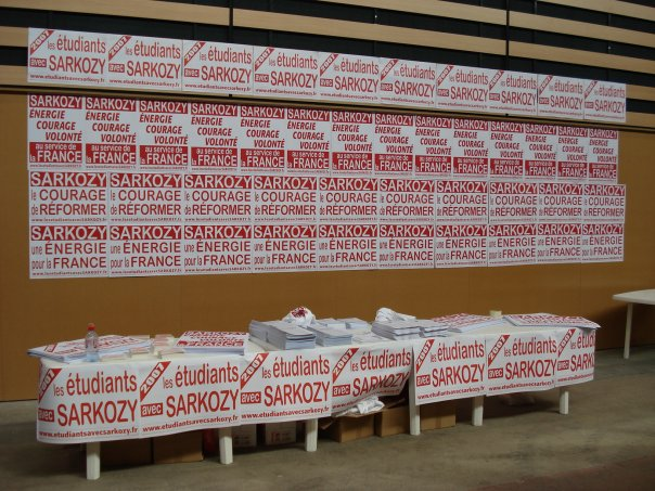 Stand de l'UNI lors du meeting de Nicolas Sarkozy à Lyon (Rhône, France).